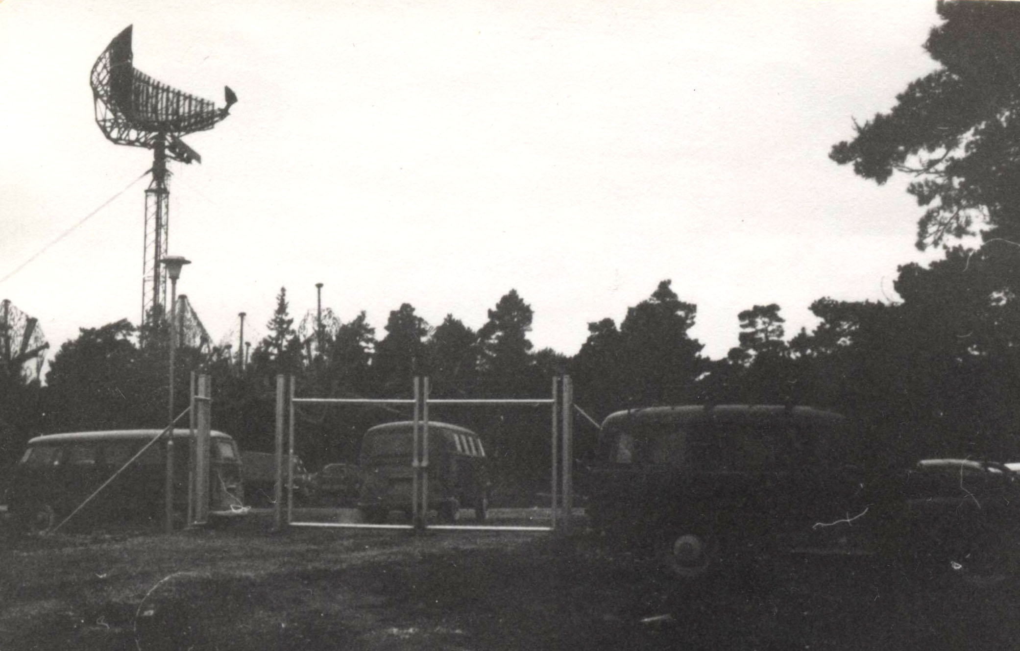 Radarn på mast på Furillen, nordöstra Gotland.